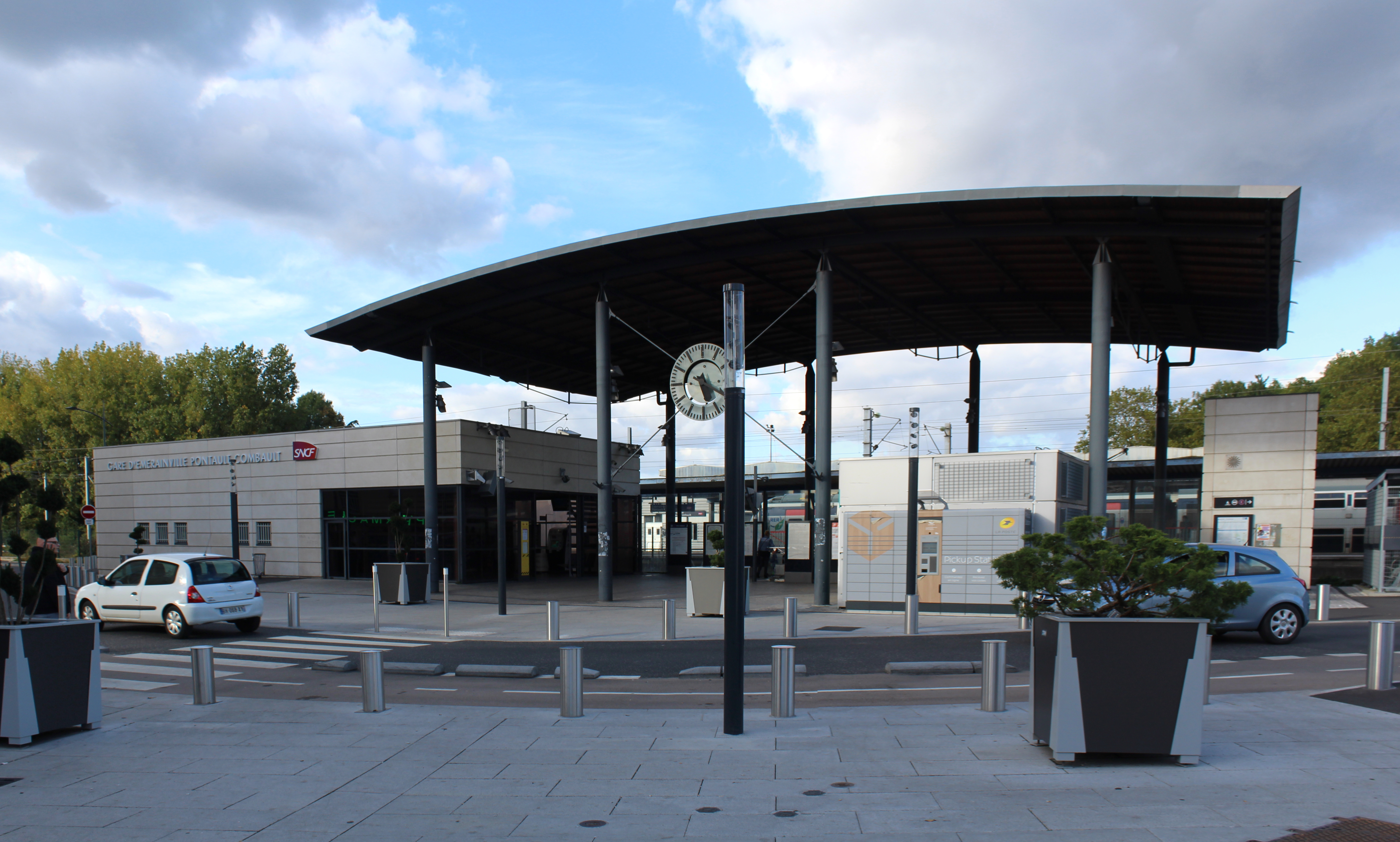 Gare d'Émerainville - Pontault-Combault, Pontault-Combault.